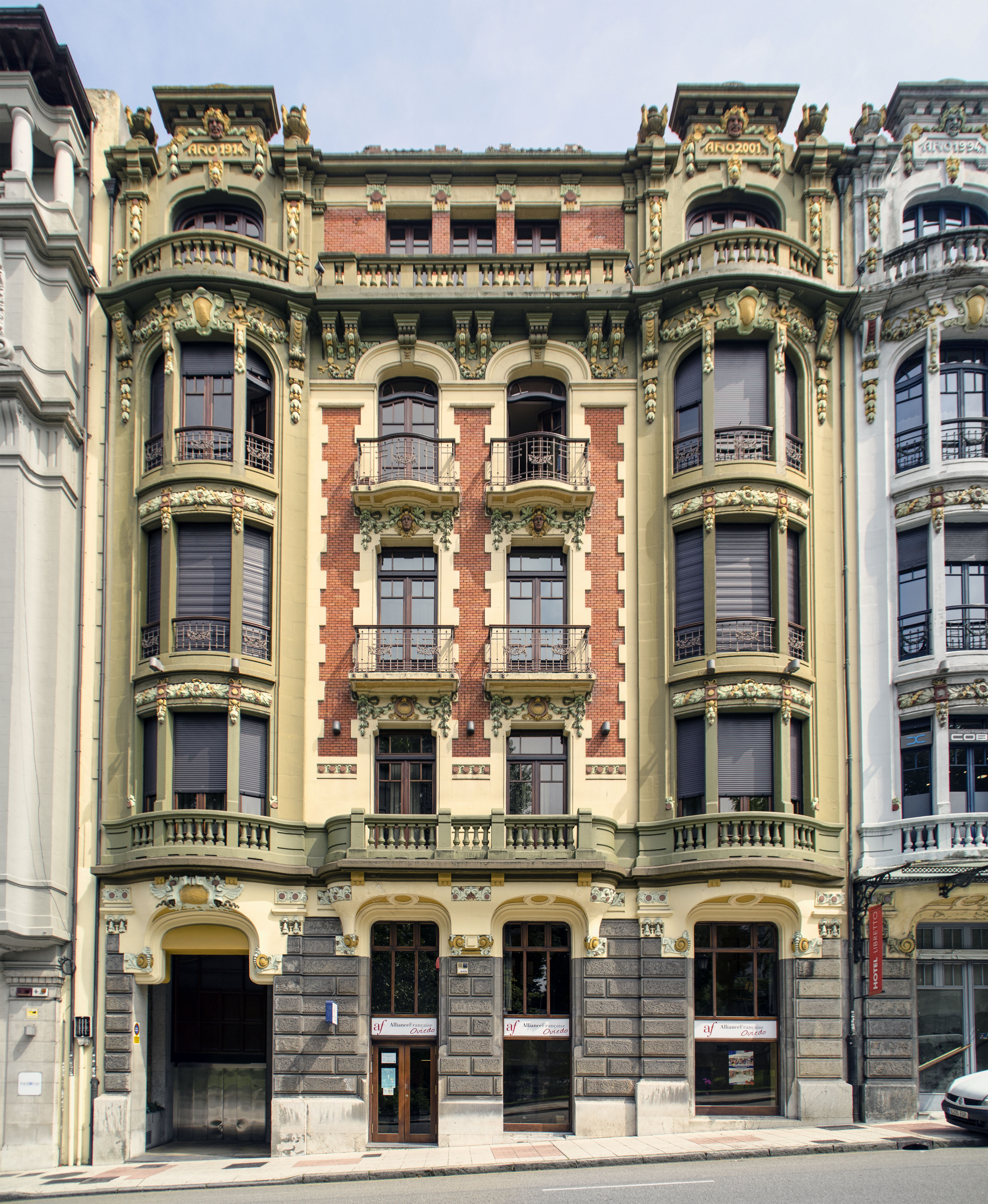 En Oviedo quedan unas cuantas casas de estilo modernista bien conservadas. Esta es una de ellas.